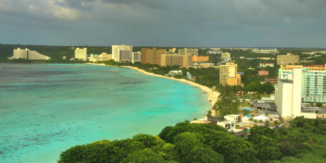 Tumon Bay